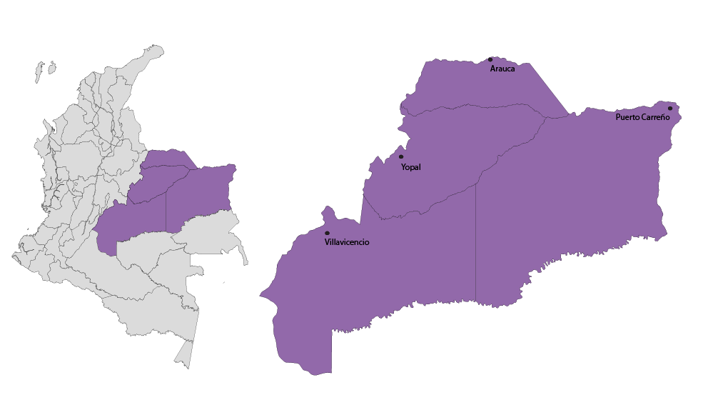 Eje musical Llanera